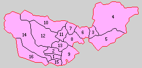 岩手県稗貫郡の町村。